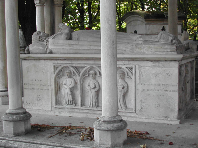 Tomba di Abelardo ed Eloisa (part.) al cimitero del Père Lacahise a parigi. foto di Aldo Ardetti